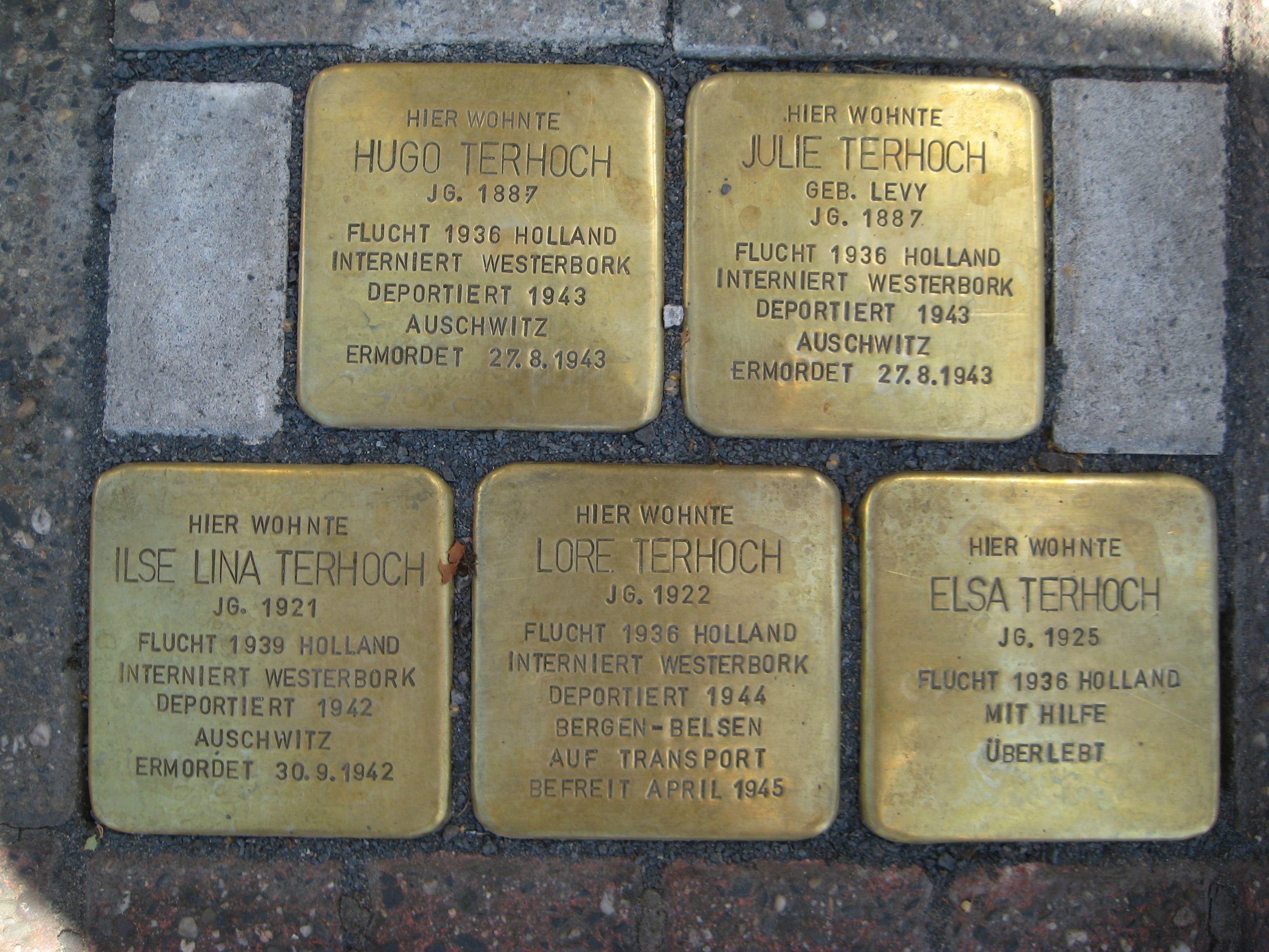 Stolpersteine der Familie Terhoch, Lünen-Gahmen, Gahmener Str. 229